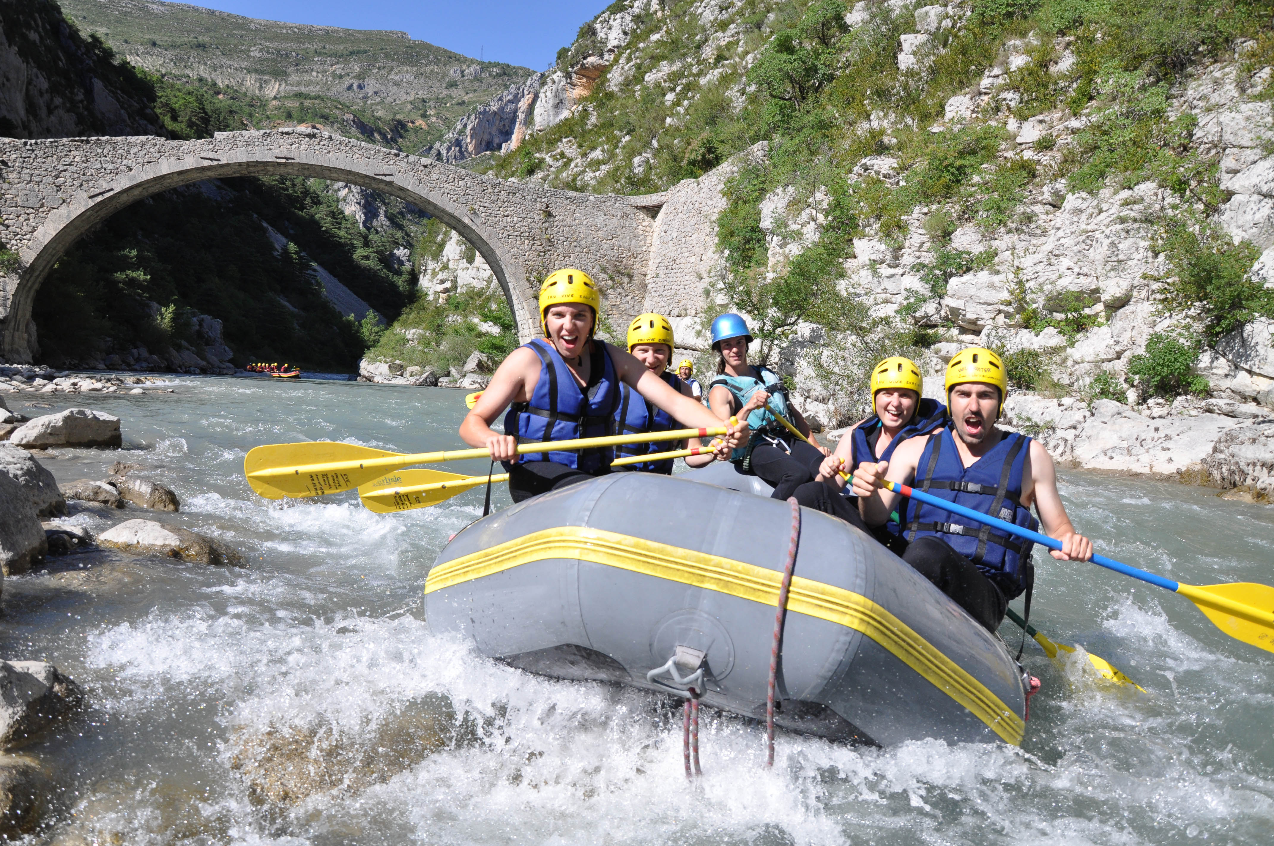 Premières frayeurs